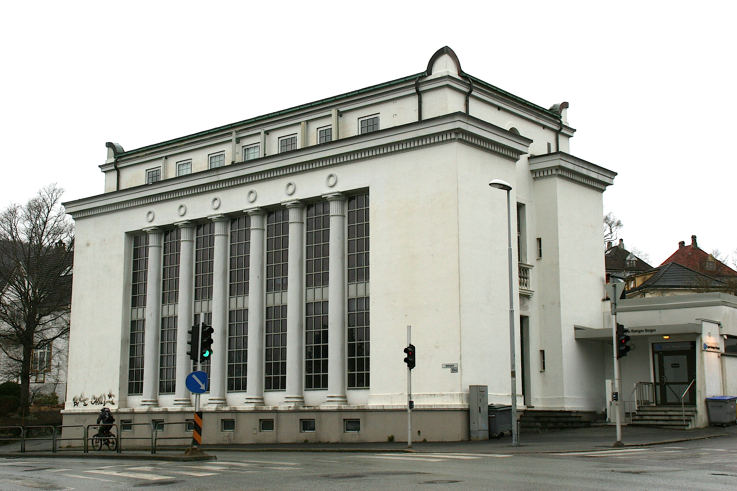 Telefonsentral Tegnet av Per Grieg